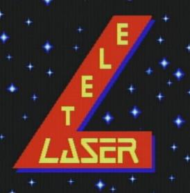 logo dellìemittente